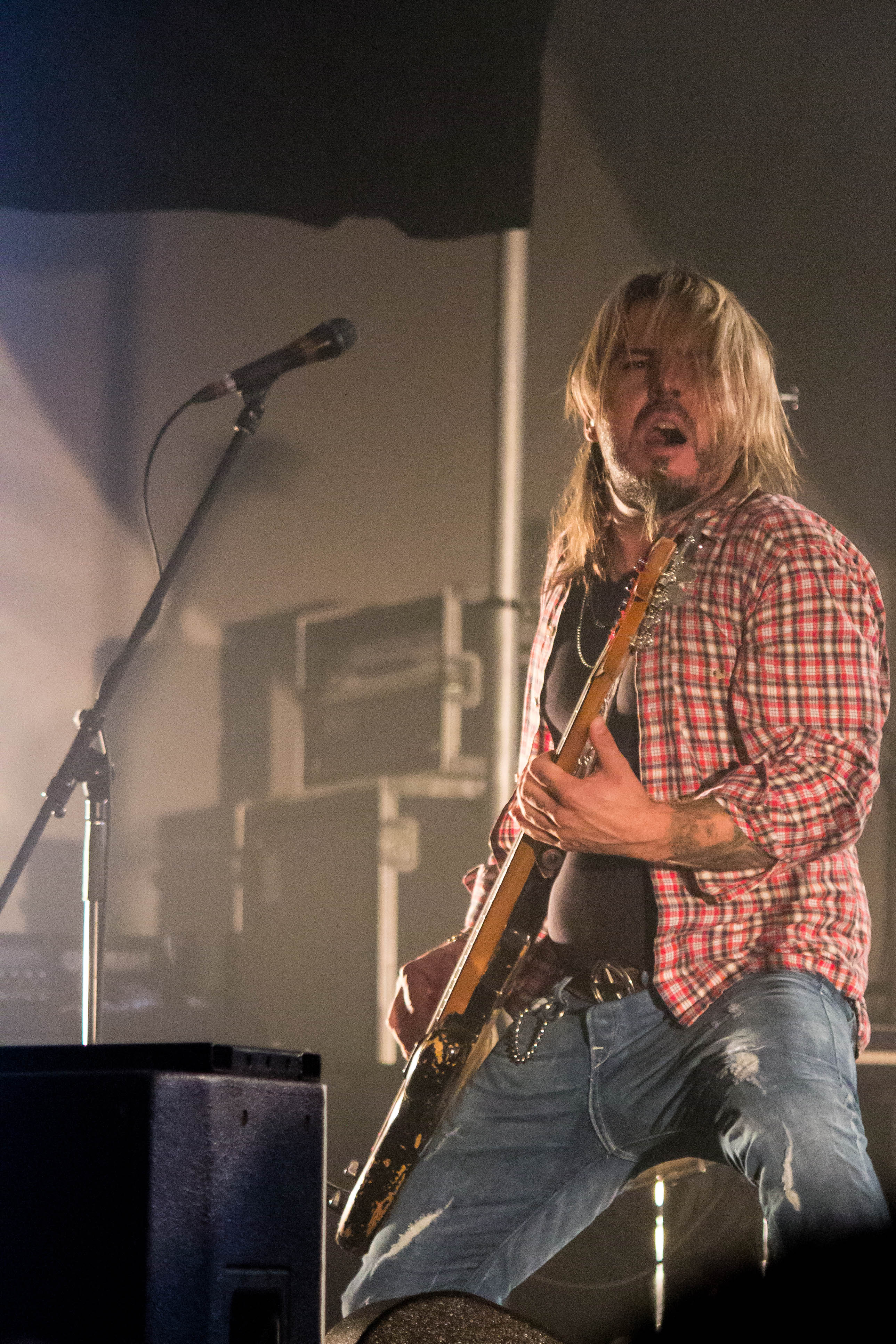 Le groupe « Kaïn » au Festival international de la chanson de Granby 2013, place Johnson.